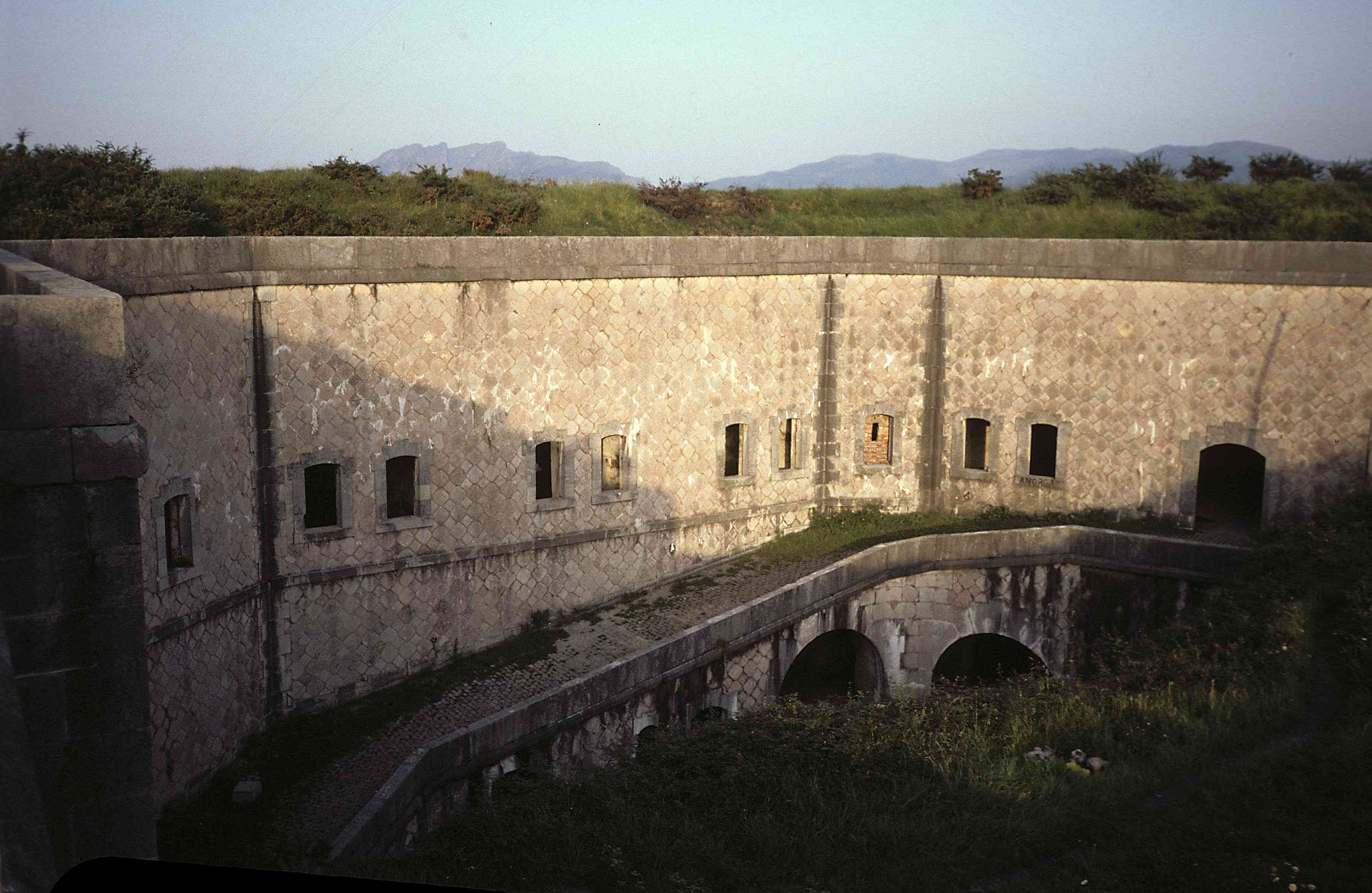 Errenteriako San Markos gotorlekua